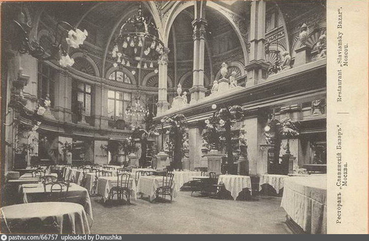 Интерьер Славянского базара